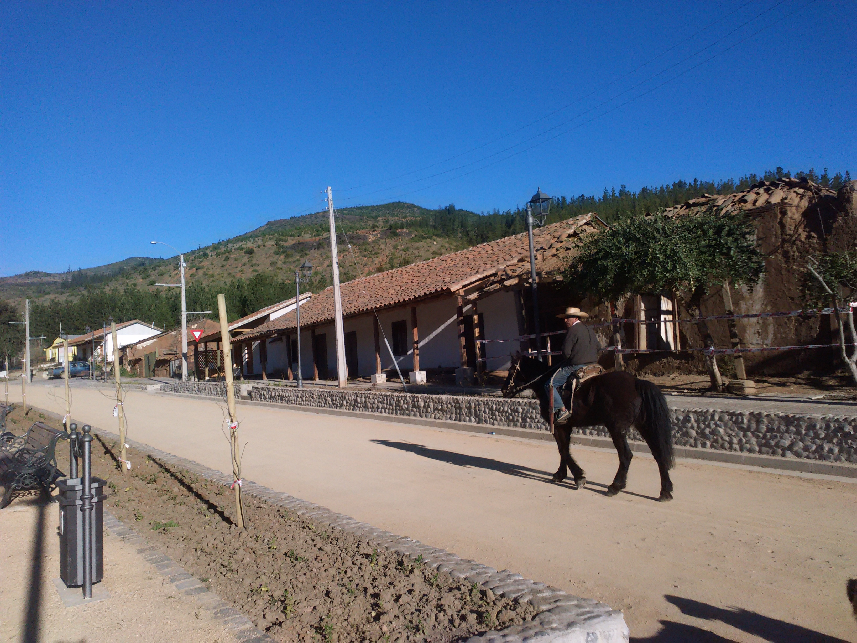 Imagen de la plaza de armas del pueblo de Huerta del Maule, VII regiòn, Chile.